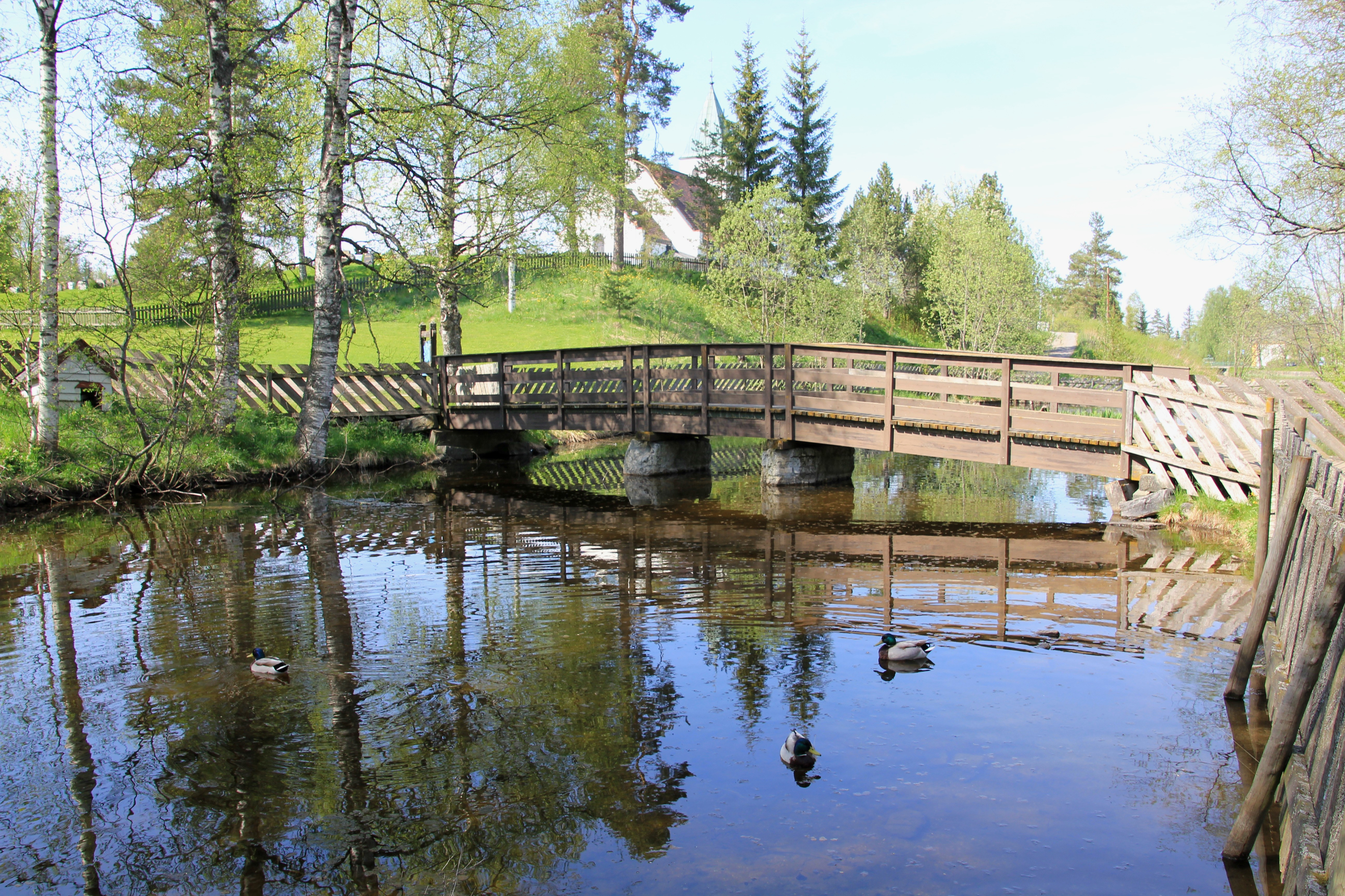 Motiv fra fugleparken på Raufoss.